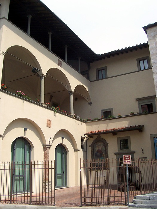 Prato - Museo dell'Opera del Duomo